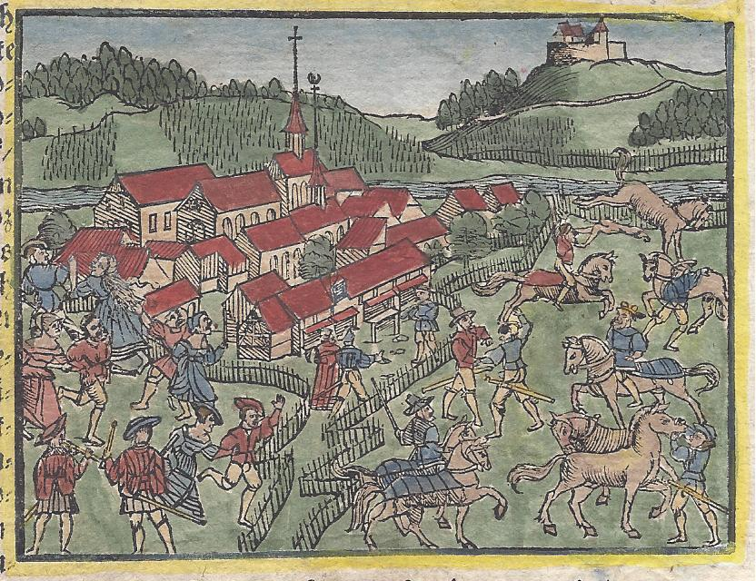 Hurentanz und Rossmarkt am Hauptmarkttag der Zurzacher Messe vor der Kulisse der Gemeinde Zurzach und der Küssaburg. Später kolorierter Holzschnitt aus der Stumpf-Chronik, Froschauer Zürich 1549.